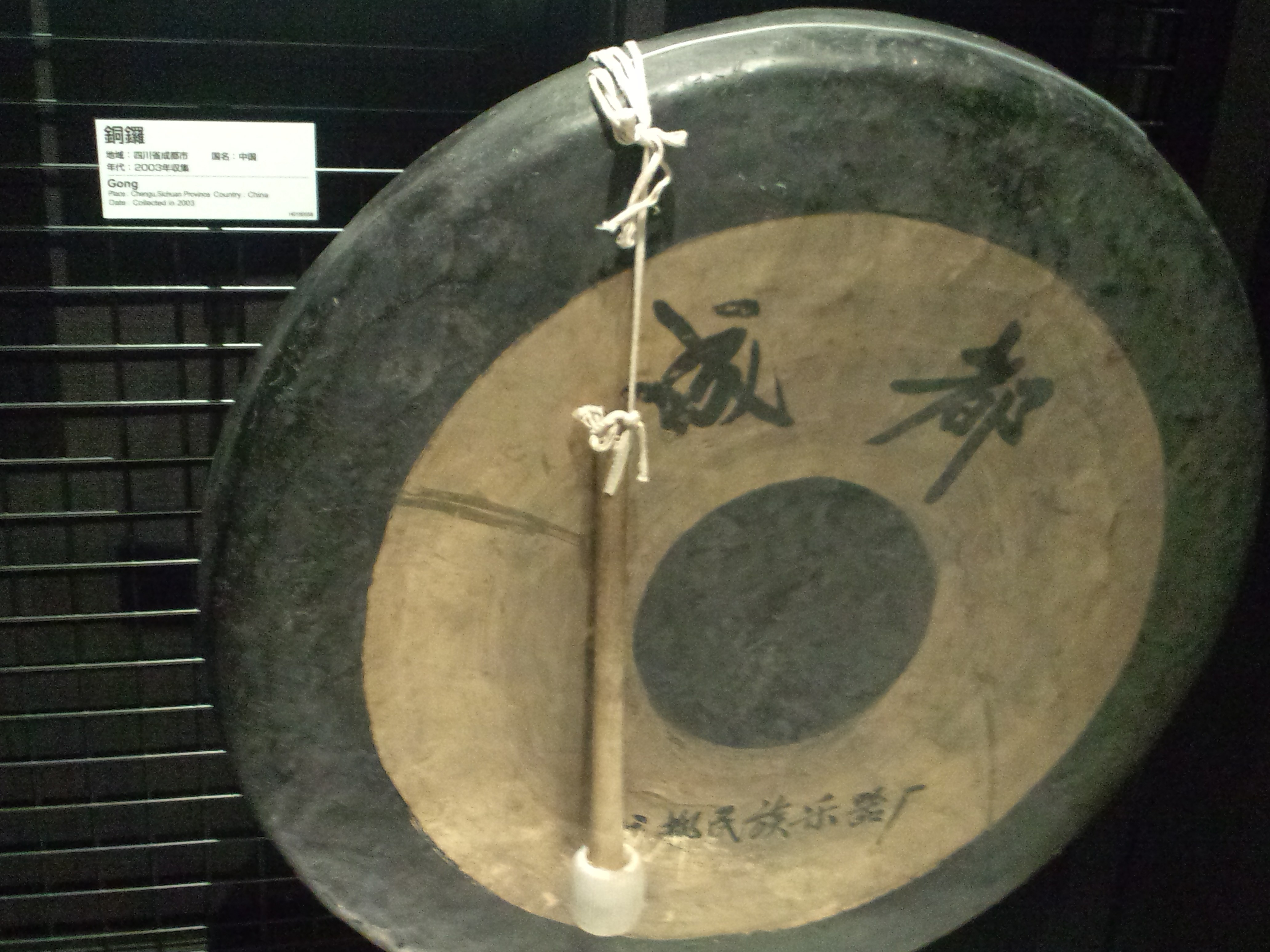 国立民族学博物館（大阪） 銅鑼（中国、四川省成都市、2003年収集）